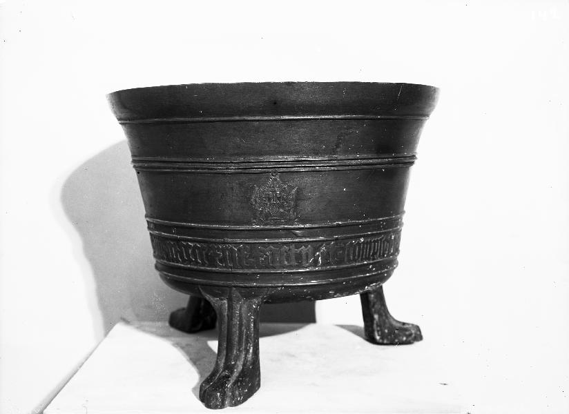 Dopfunt, koppar, rund på tre tassfötter, daterad 1418. Kategori: (04) DopfuntarDopfunt, koppar, rund på tre tassfötter, daterad 1418.